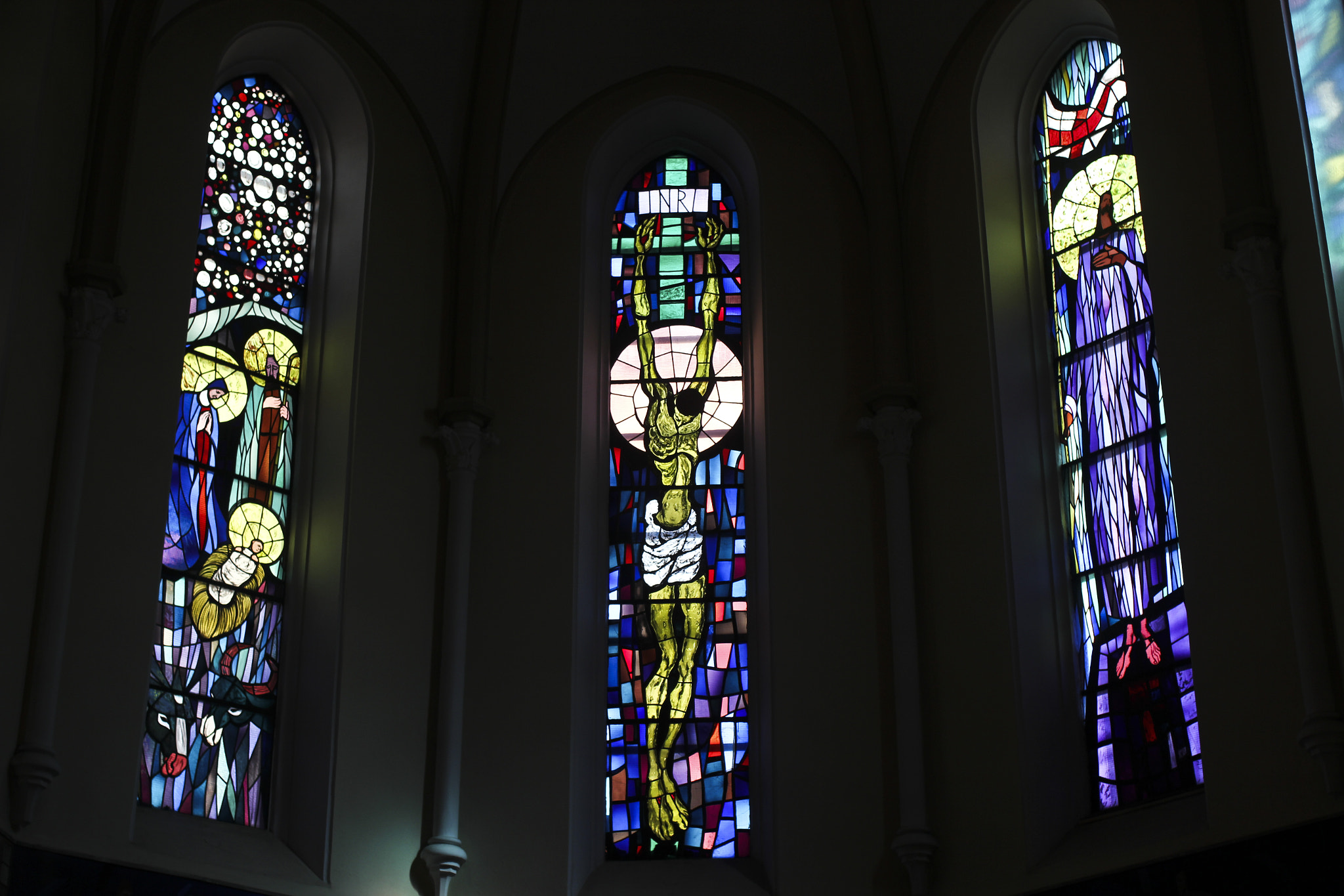 500px provided description: Sarajevo Bosnie Herzegovine O